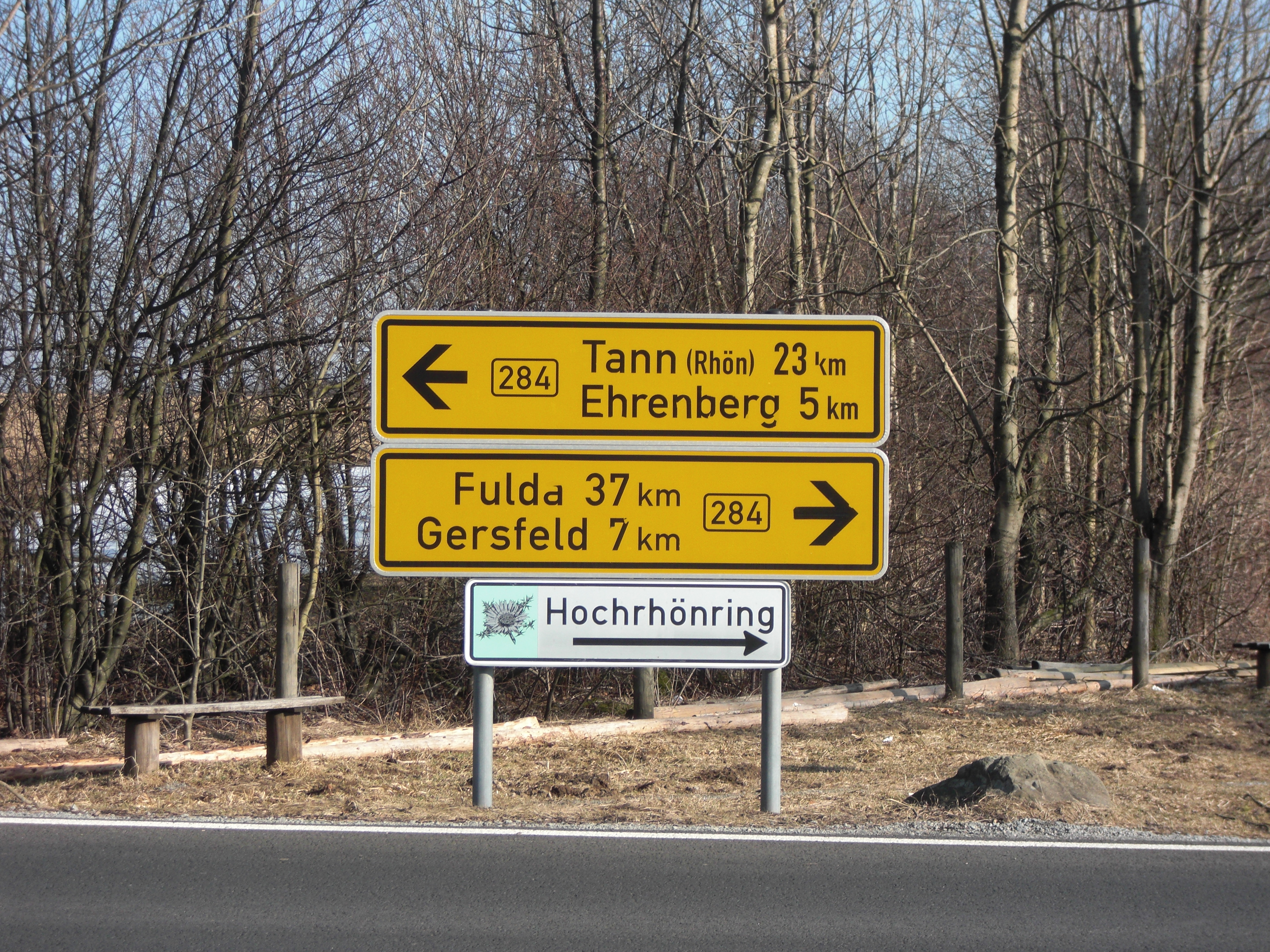 Hinweisschild des Hochrhönrings